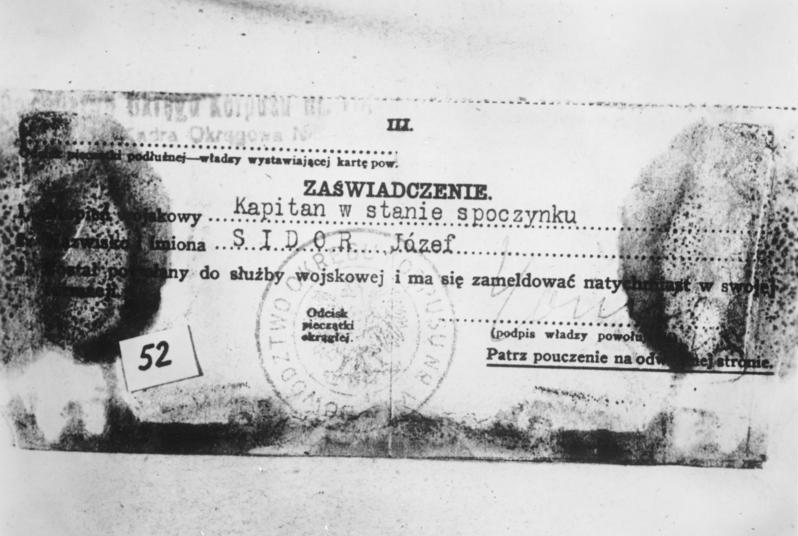 This description has been identified as biased or incorrect: Propaganda and liesZentralbild, II. Weltkrieg 1939 - 45 Im April 1943 starten die deutschen Faschisten die antisowjetische Propaganda über den Massenmord im Katyner Wald, 15 klm nw. von Smolensk, wo sie Massengräber mit ca. 11 000 ermordeten kriegsgefangenen Polen als Greueltaten der Sowjets erklärten. ( Die Außerordentliche Staatliche Kommission unter Leitung des Akademikers Burdenko stellte in ihrem Untersuchungsbericht vom 24.01.1944 fest, dass die Ermordungen nicht wie die Faschisten behauptet hatten, im Frühjahr 1940 sondern erst im Herbst 1941, also von den Faschisten selbst, stattgefunden haben.) UBz: ein bei der Leiche des ermordeten polnischen Fliegerhauptmanns Josef Sidor gefundenes Dienstschreiben. April 1943